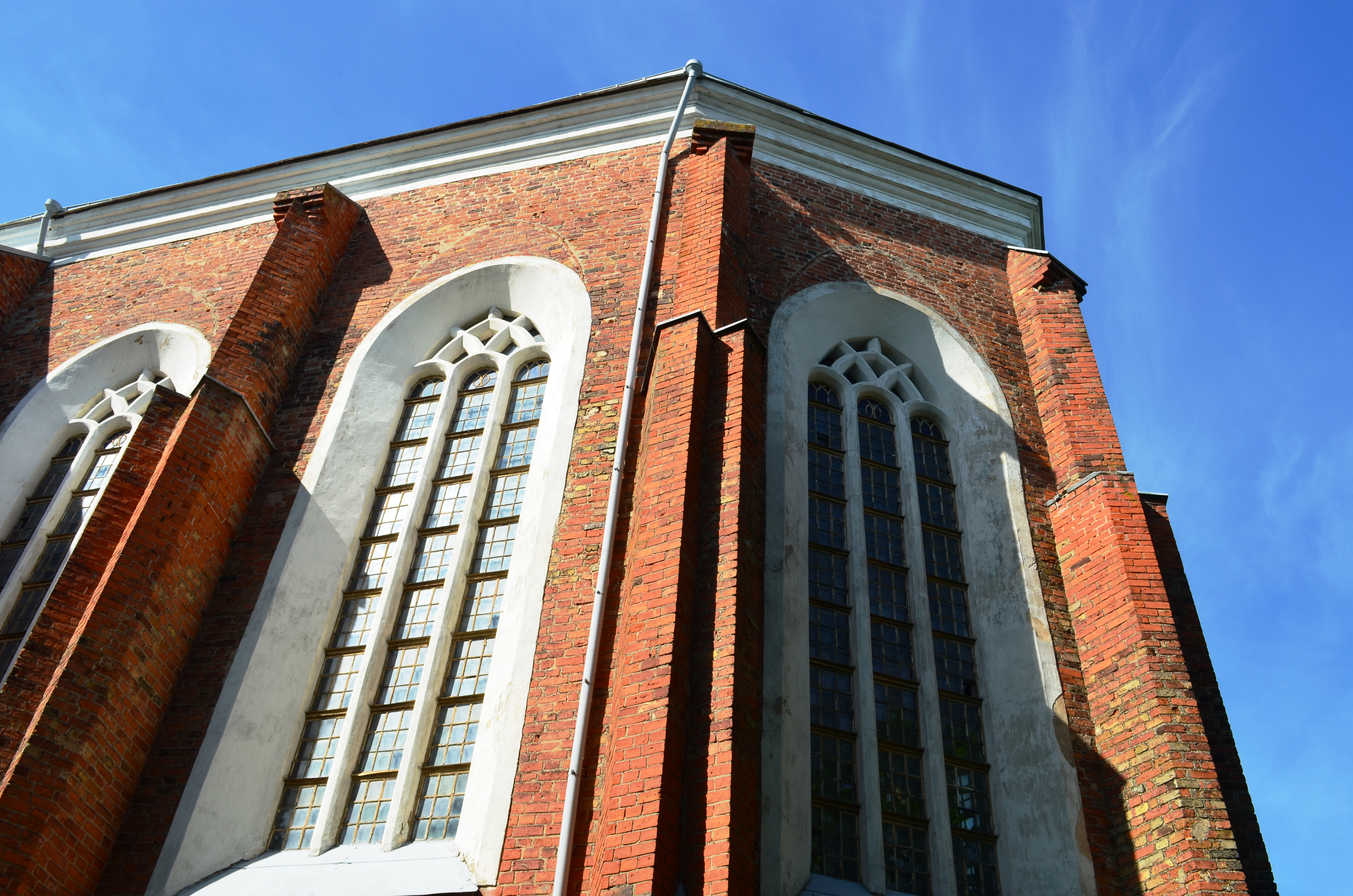 Kėdainių Šv. Jurgio bažnyčios fragmentas